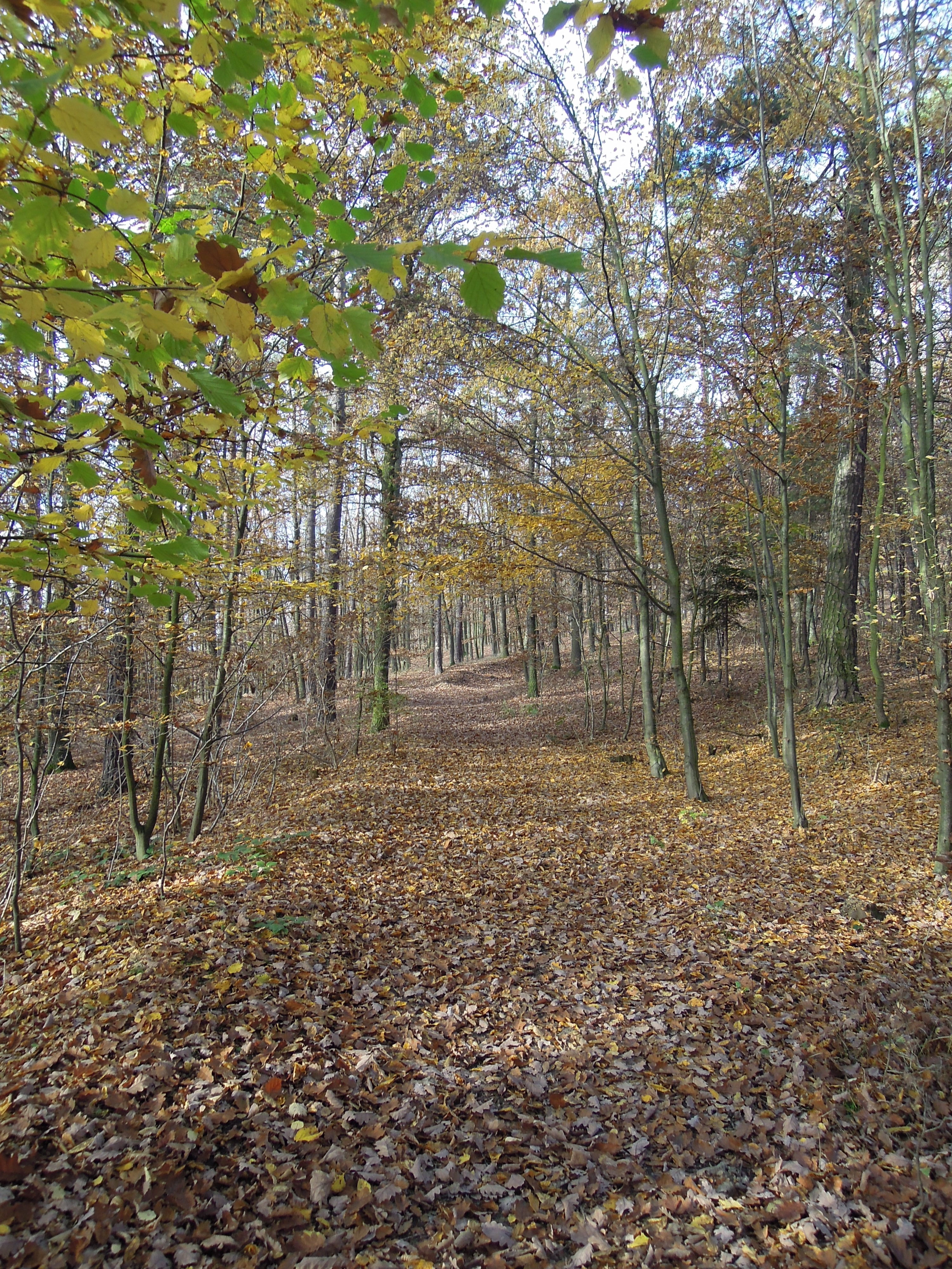 podzimní les, přírodní rezervace Šance